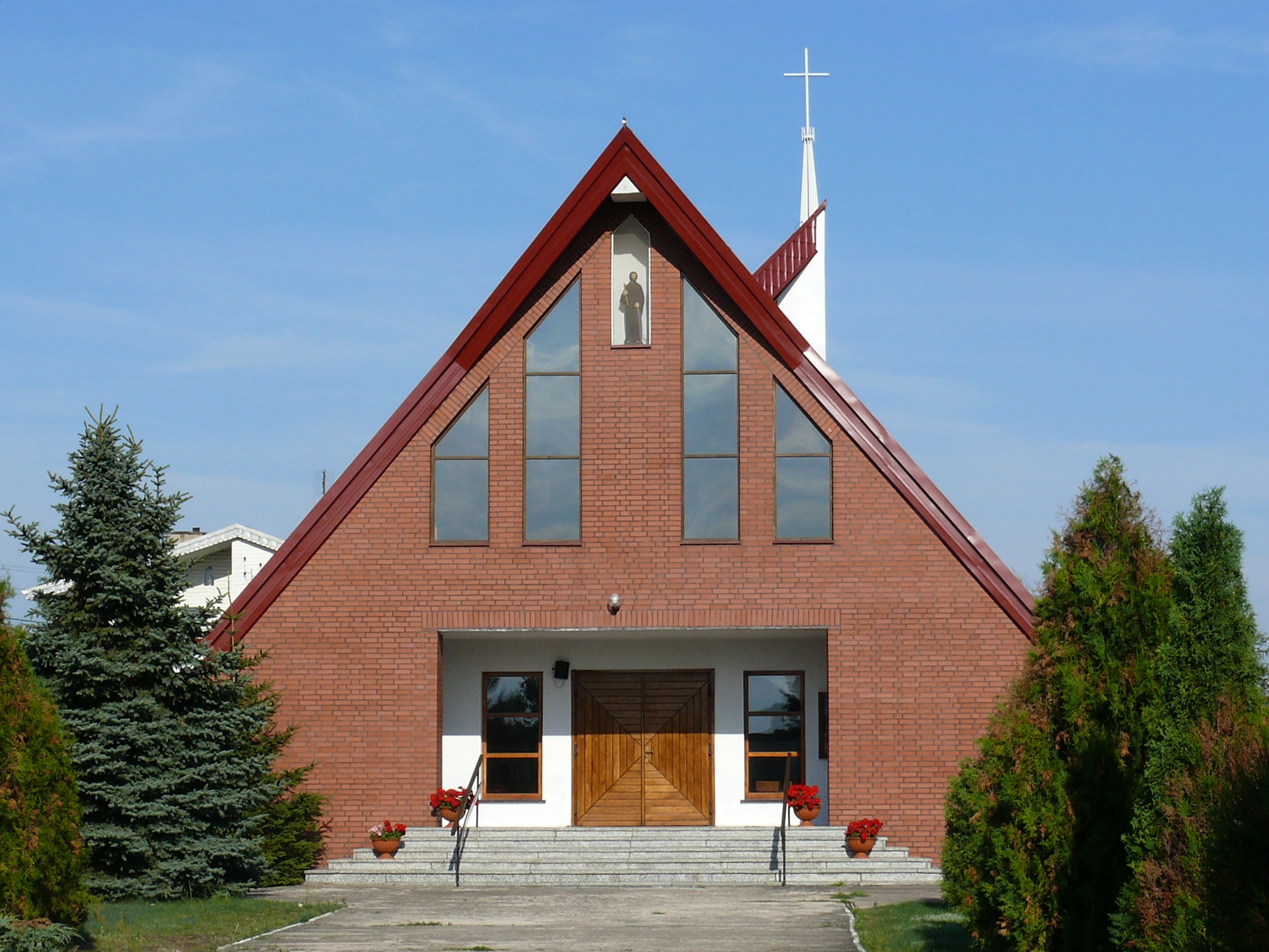 kościół parafialny w Kunach